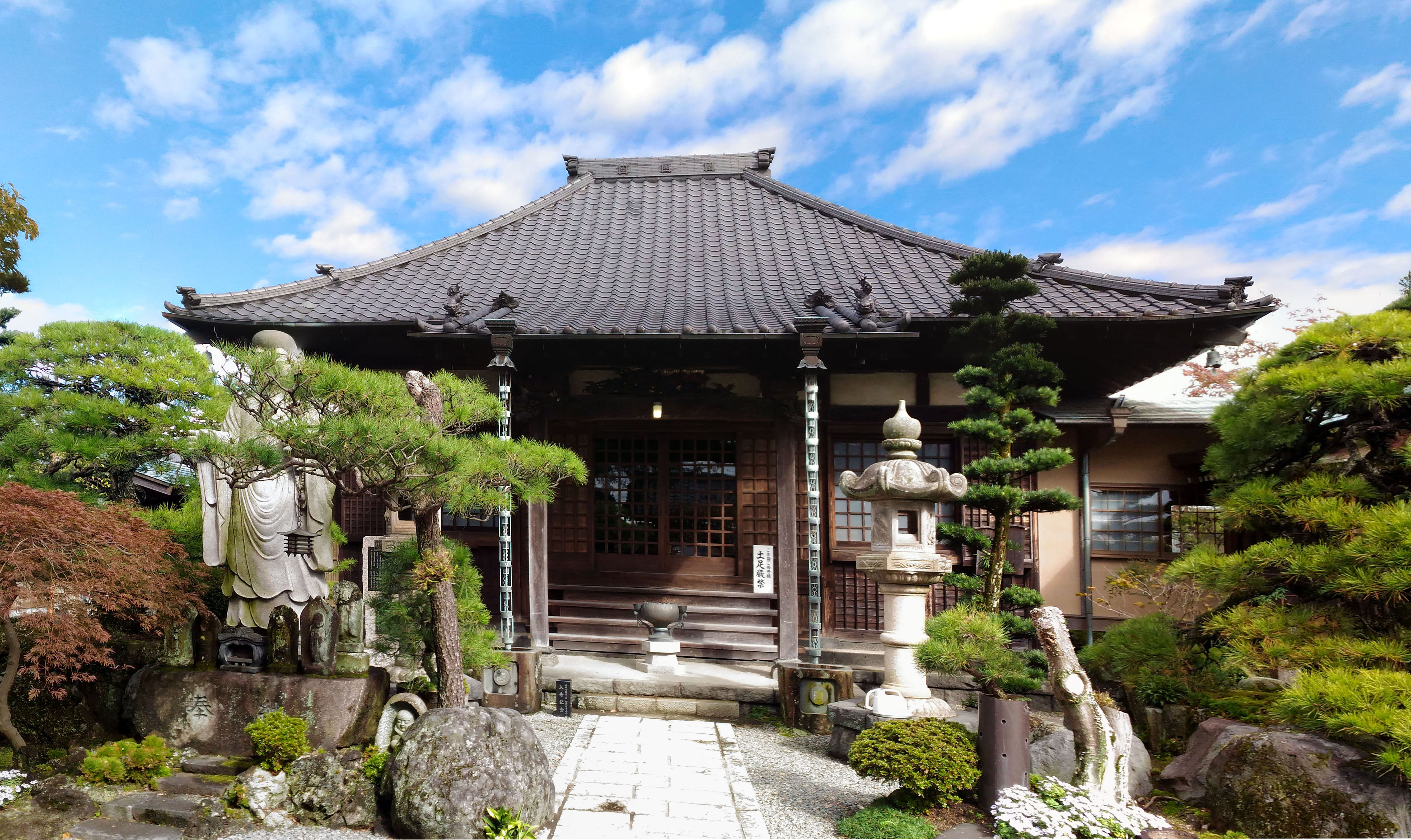 富士市厚原本照寺本堂